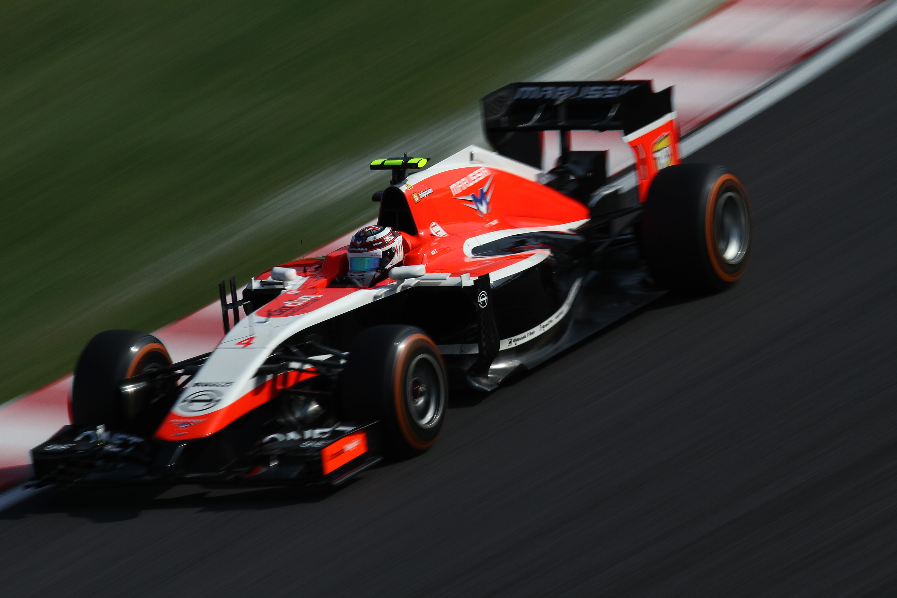 2014.10.3 F1 Rd.15 Suzuka FP2, Marussia F1 Team (MR03) 4 マックス・チルトン [IMG_8858ks]